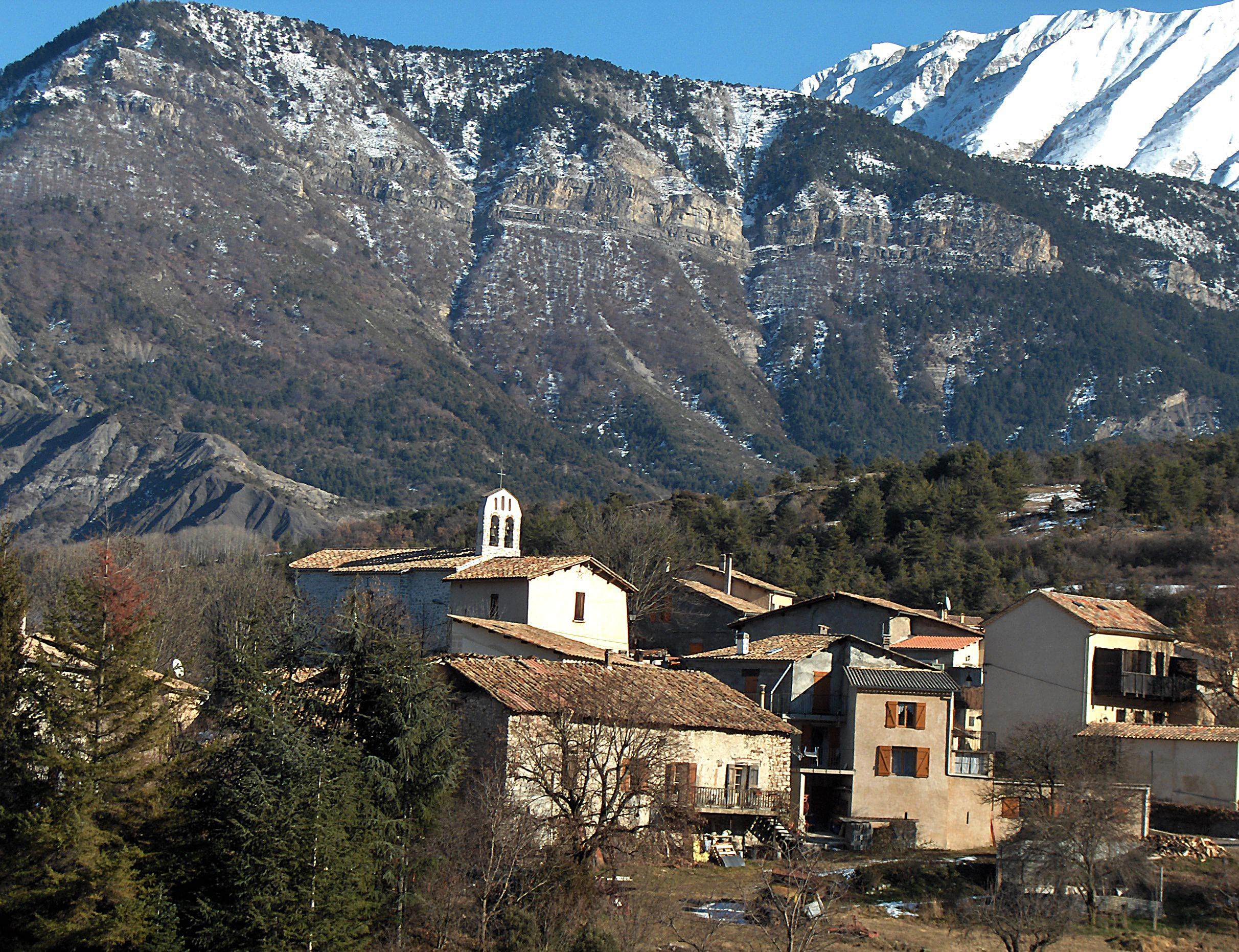 Photo du village de Draix ((04) France)¨